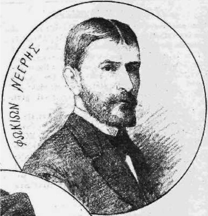 griechischer Politiker, 19. Jahrhundert